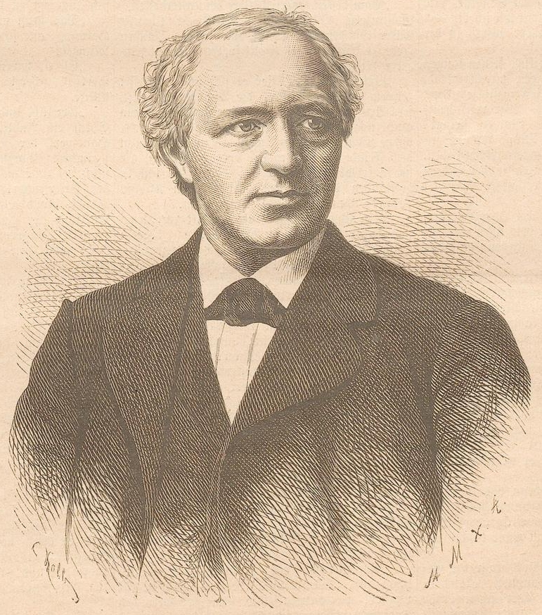 Christian Wilhelm Ludwig von Abeken. In: Illustriertes Unterhaltungs-Blatt: wöchentliche Beilage zum Darmstädter Tagblatt. Darmstadt, 1886